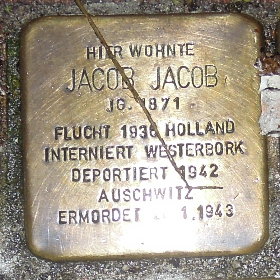 Stolperstein Geldern Gelderstraße 5 Jacob Jacob